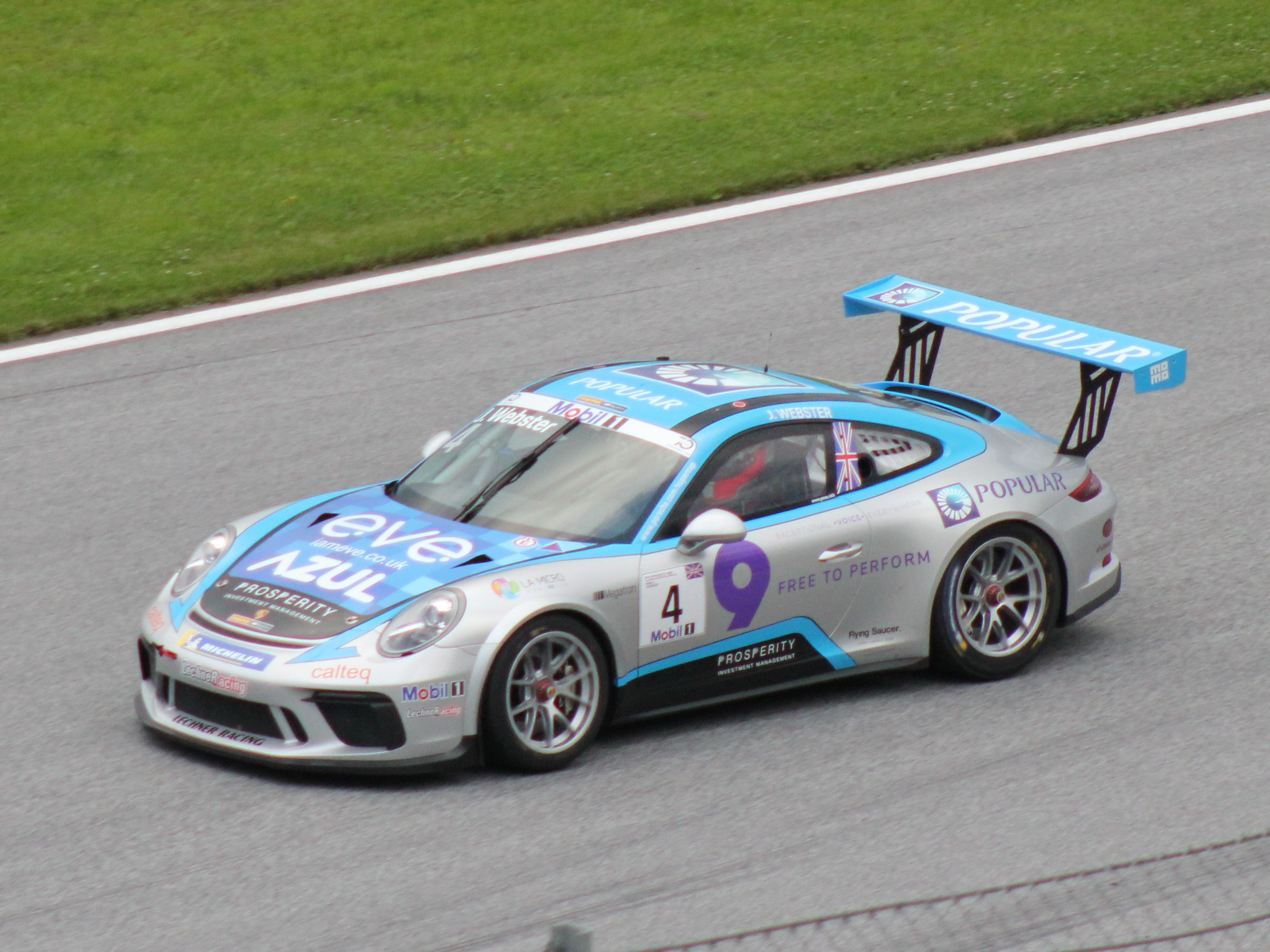 4 Josh Webster beim Rennwochenende in Österreich 2018